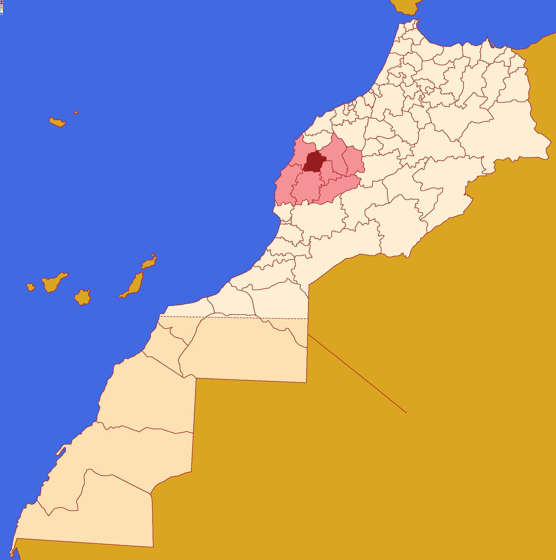 Localização da província de Youssoufia ,dentro da região de Marraquexe-Safim e dentro de Marrocos. Conforme a reforma administrativa de 2015.